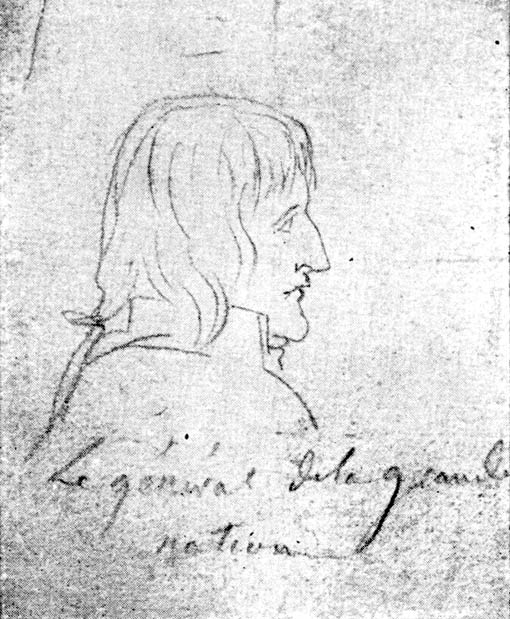 Dessin de David représentant Napoléon Bonaparte de profil esquisse faite en 1798. Avec en dessous l'inscription « le général de la grande nation»